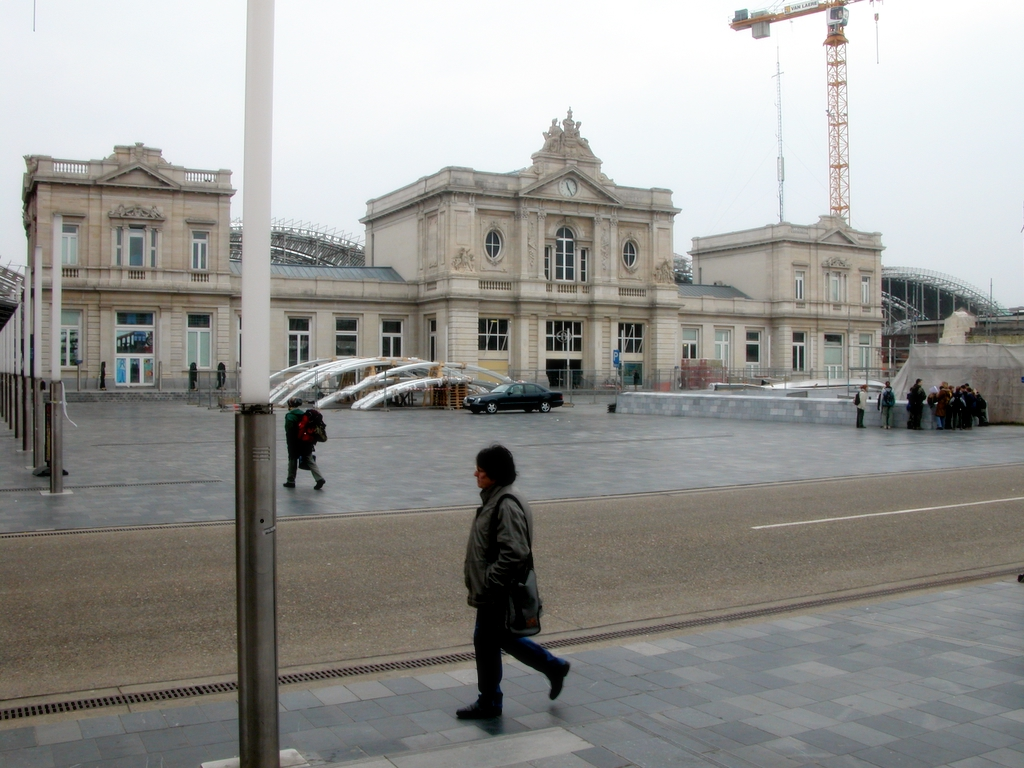 Trein station Leuven Martelarenplein